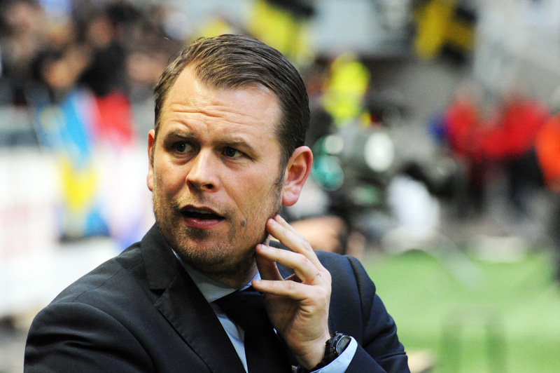 Mikael Stahre